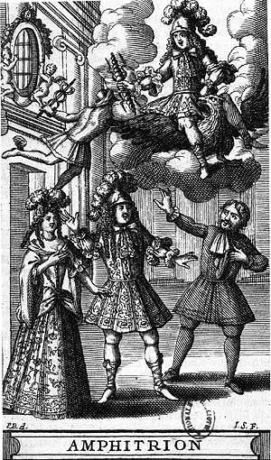 Frontispice de l'édition de 1682.